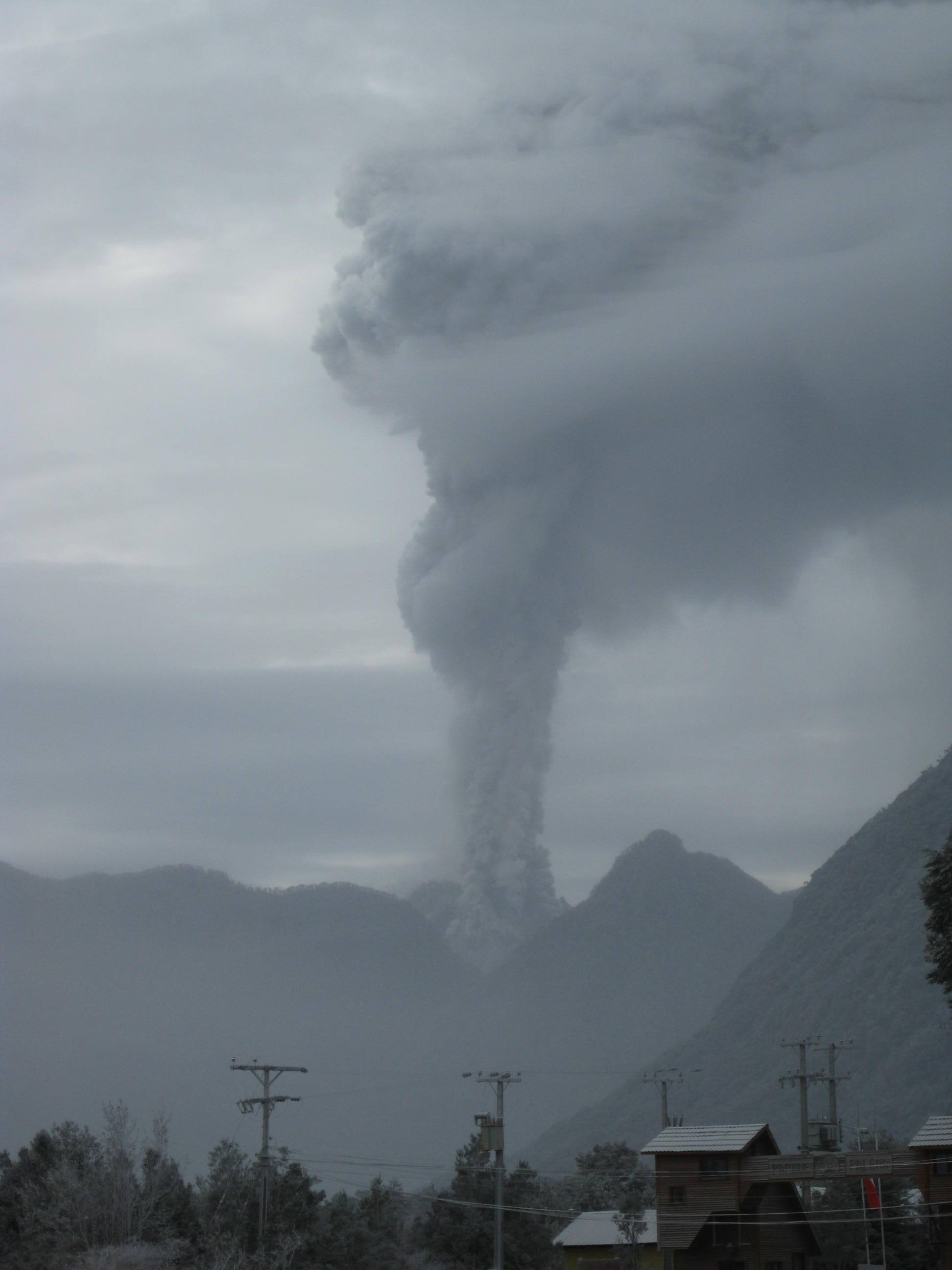 columna de humo del Volcán Chaitén.